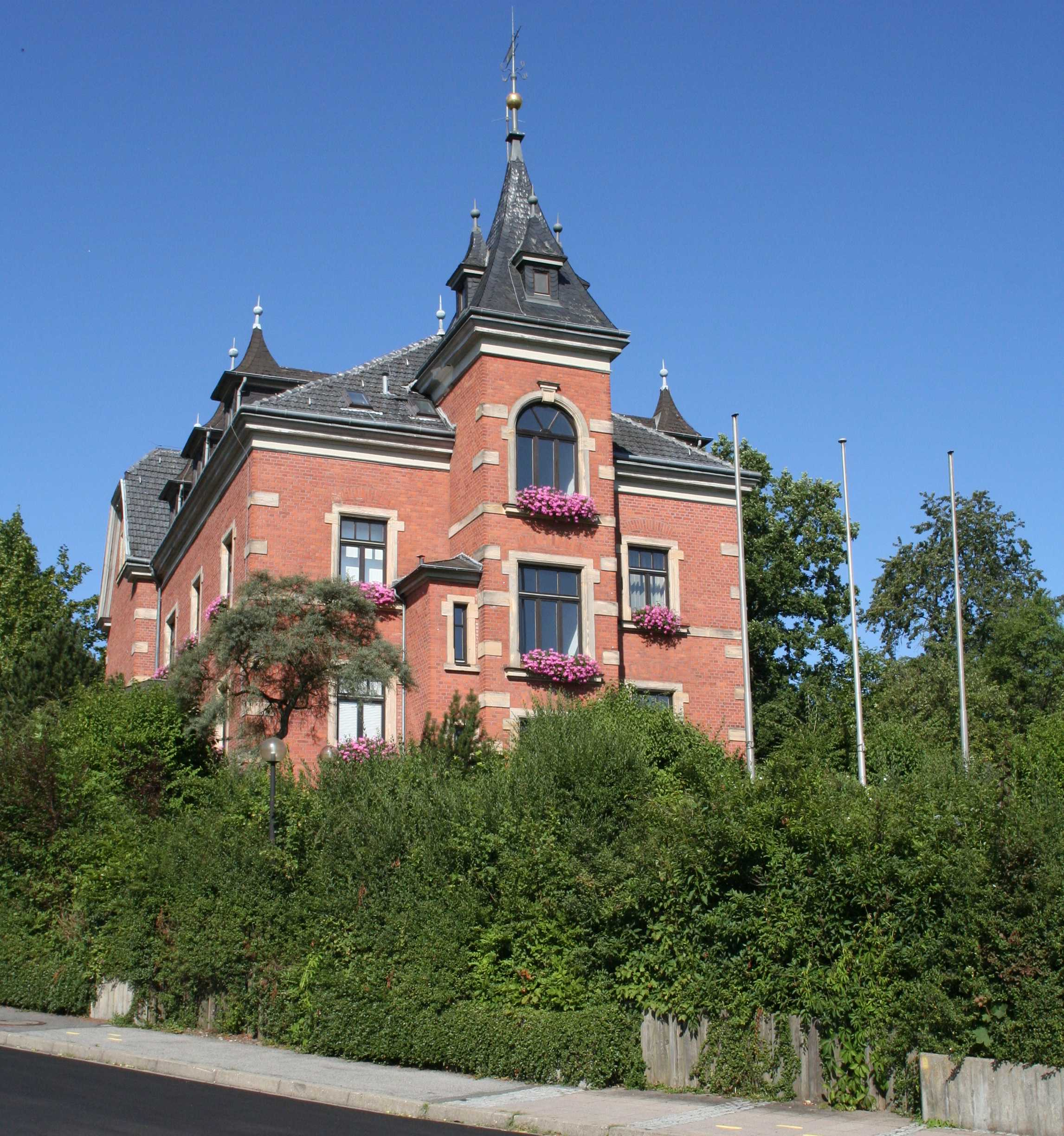 Rathaus Weitramsdorf Weitramsdorf im Landkreis Coburg